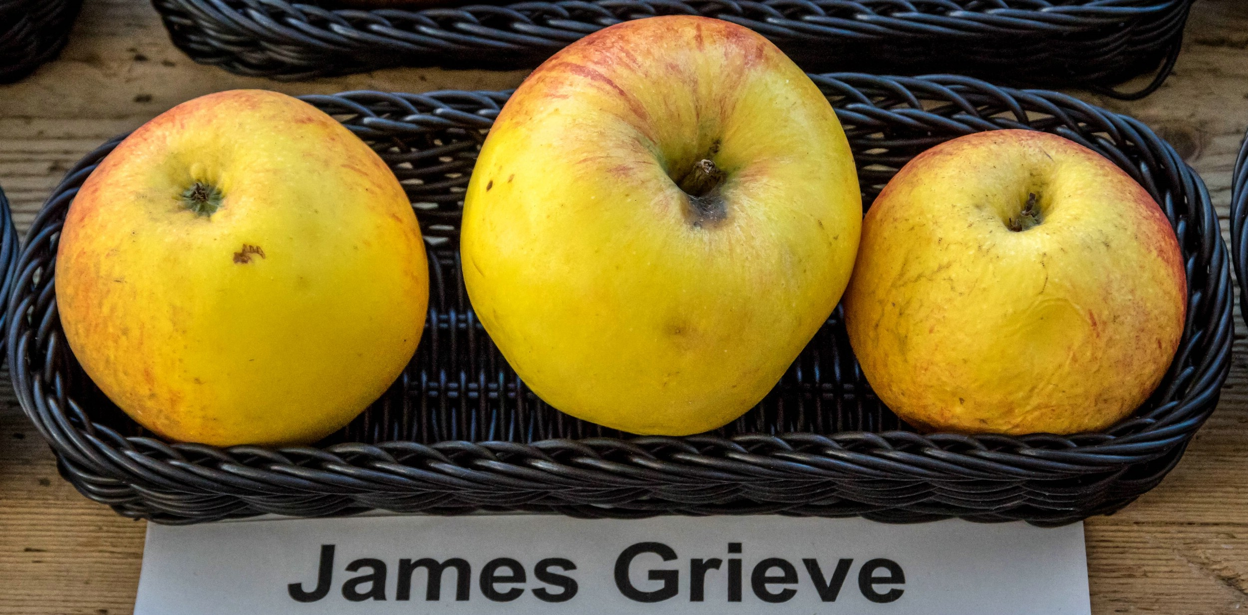 Alte Apfelsorten, von denen es im Badischen noch tragende Bäume gibt. Alle Aufnahmen au dem Oktober 2015